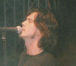 Gianluigi Cavallo detto "Cabo".